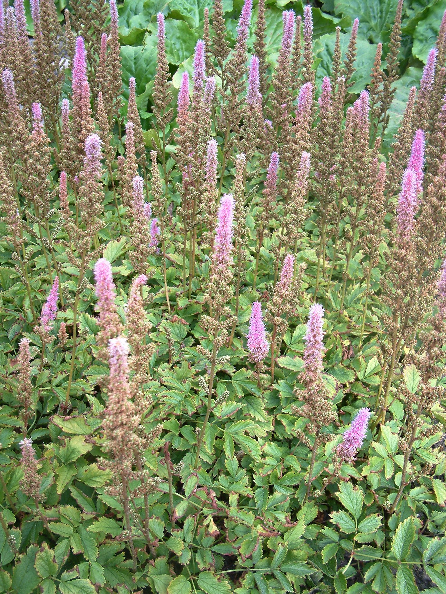 Astilbe chinensis 'Pumila', Botanical Garden in Poznań